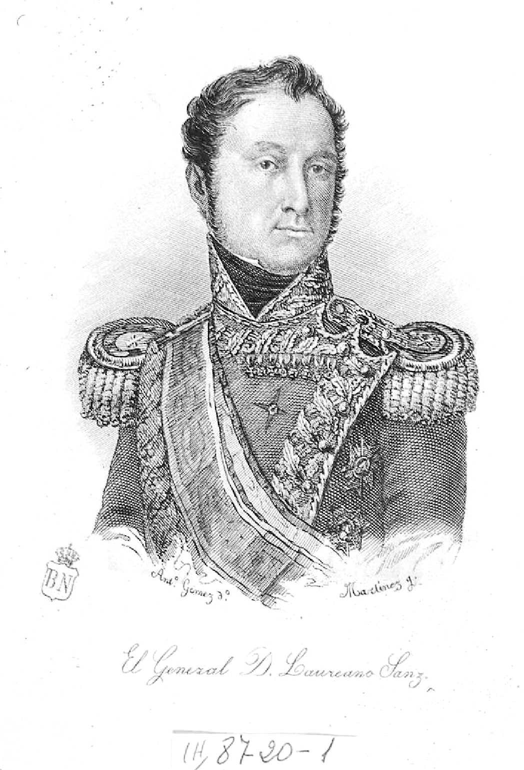 Laureano Sanz Alfeirán, grabado calcográfico de Domingo Martínez Aparici según dibujo de Antonio Gómez Cros. Biblioteca Nacional de España